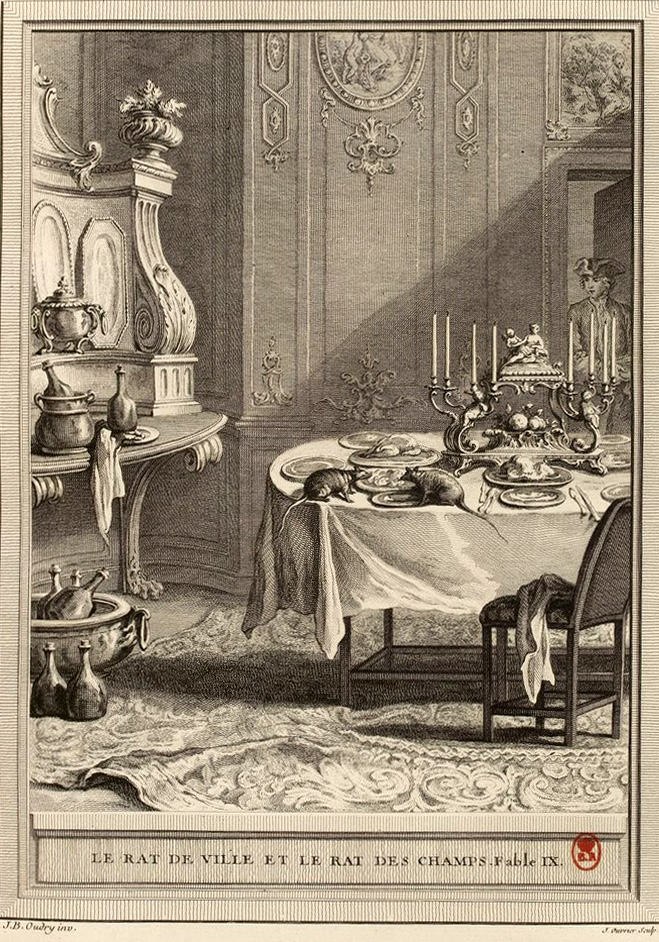 Gravure réalisée par Jean Ouvrier d'après un dessin de Jean-Baptiste Oudry représentant la fable Le rat des villes et le rat des champs de Jean de La Fontaine (fable 9 du livre I). Cette gravure est parue dans l'édition complète des fables de La Fontaine, parue en quatre tomes chez l'éditeur Desaint & Saillant, rue saint Jean de Beauvais à Paris, 1755-1759.